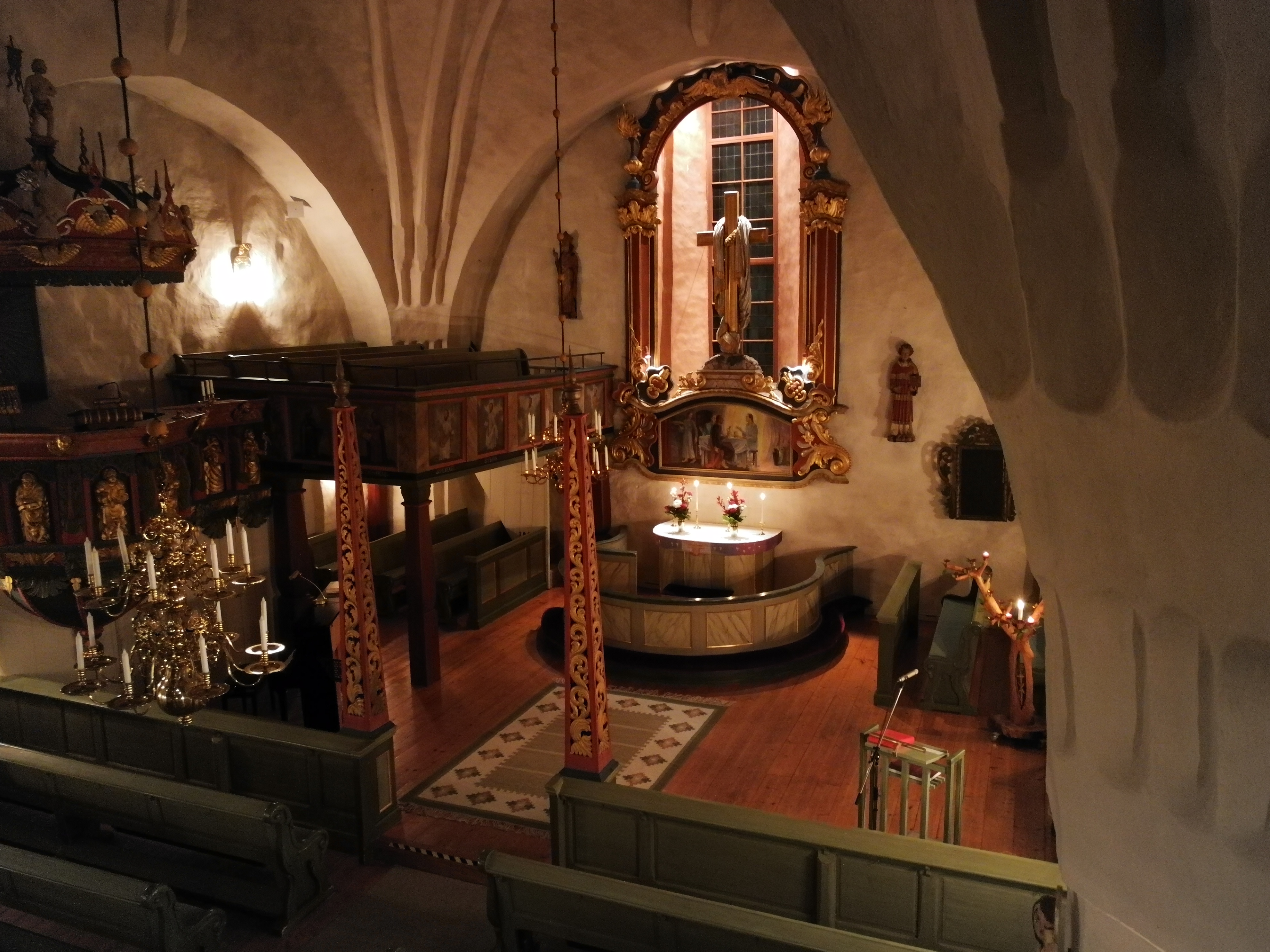 Sidensjö Kyrkas interiör, fotat från orgelläktaren.